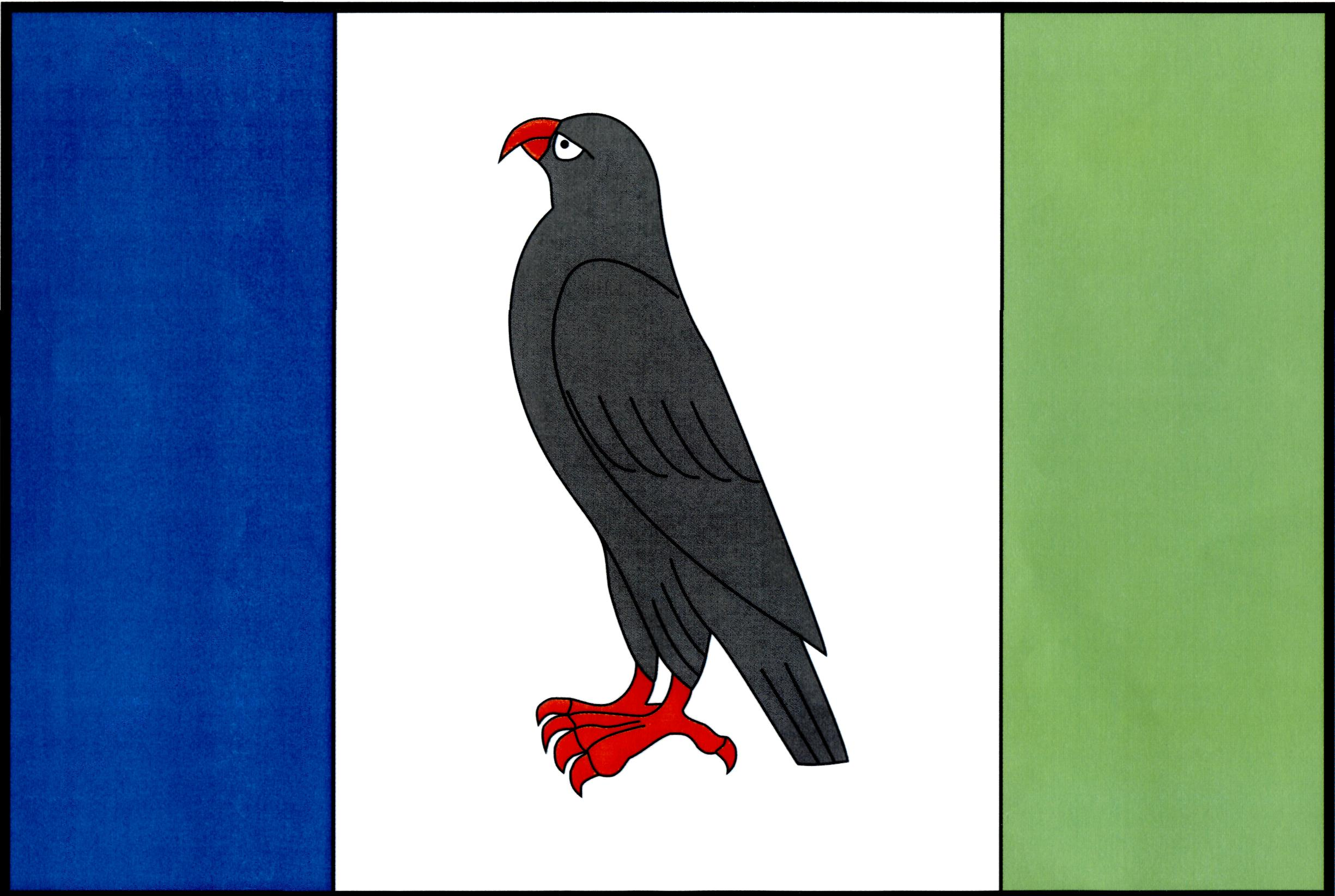 Vlajka obce Dolní Sokolovec